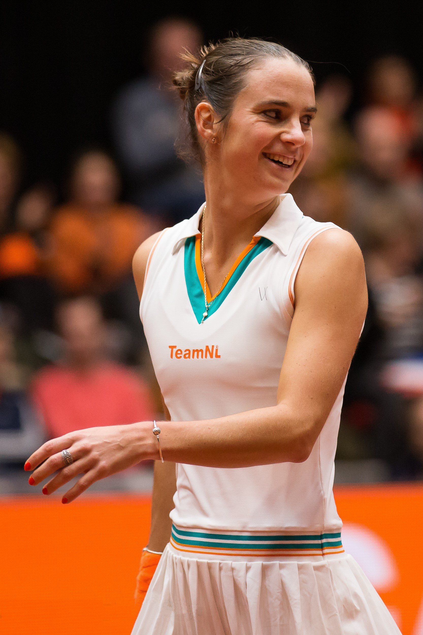 10-02-2019: Tennis: FED cup Nederland v Canada: Den Bosch Bibianne Schoofs (Nederland)